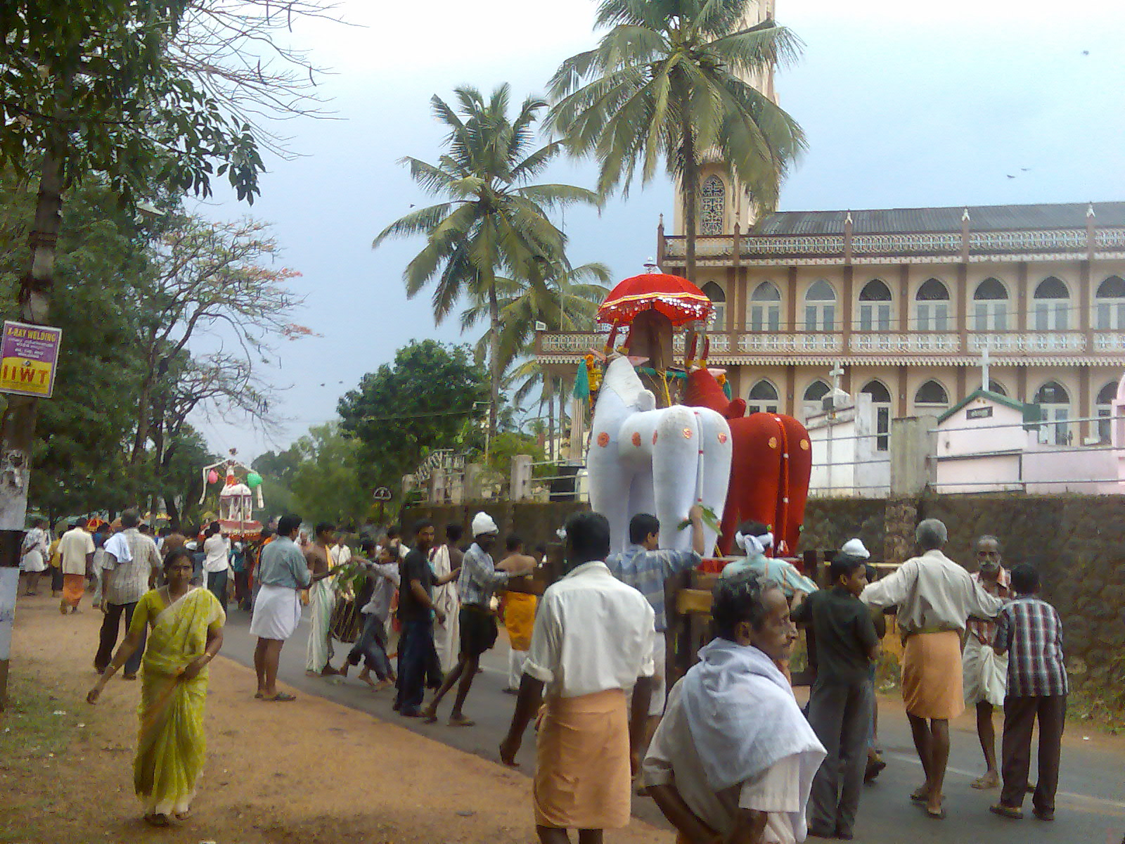 ശ്രീ ഭഗവതികുന്നു ക്ഷേത്രത്തിൻറെ കെട്ടുകാഴ്ച.